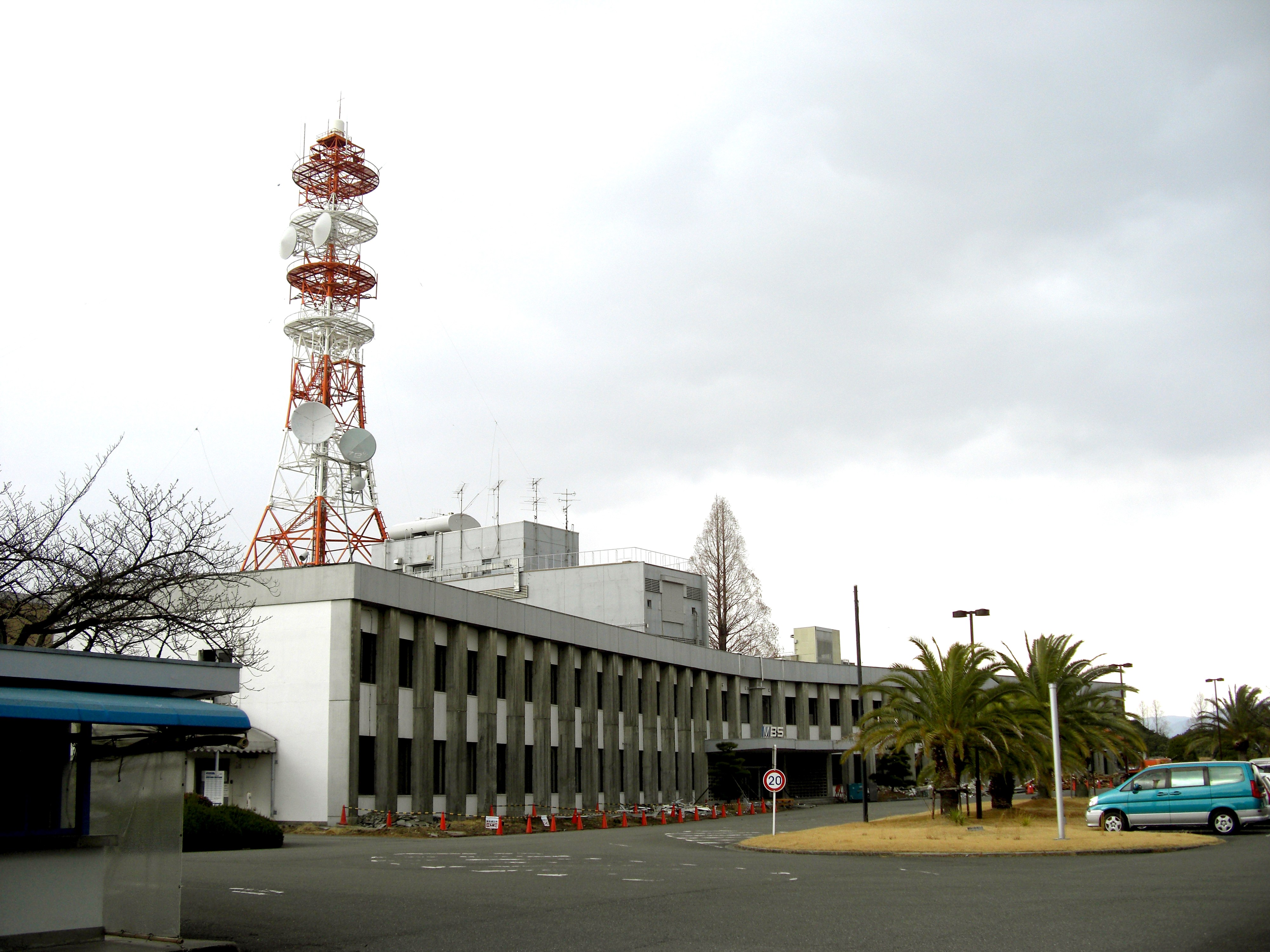 Senrioka Broadcasting Center,Senrioka-kita Suita-shi Osaka Japan.